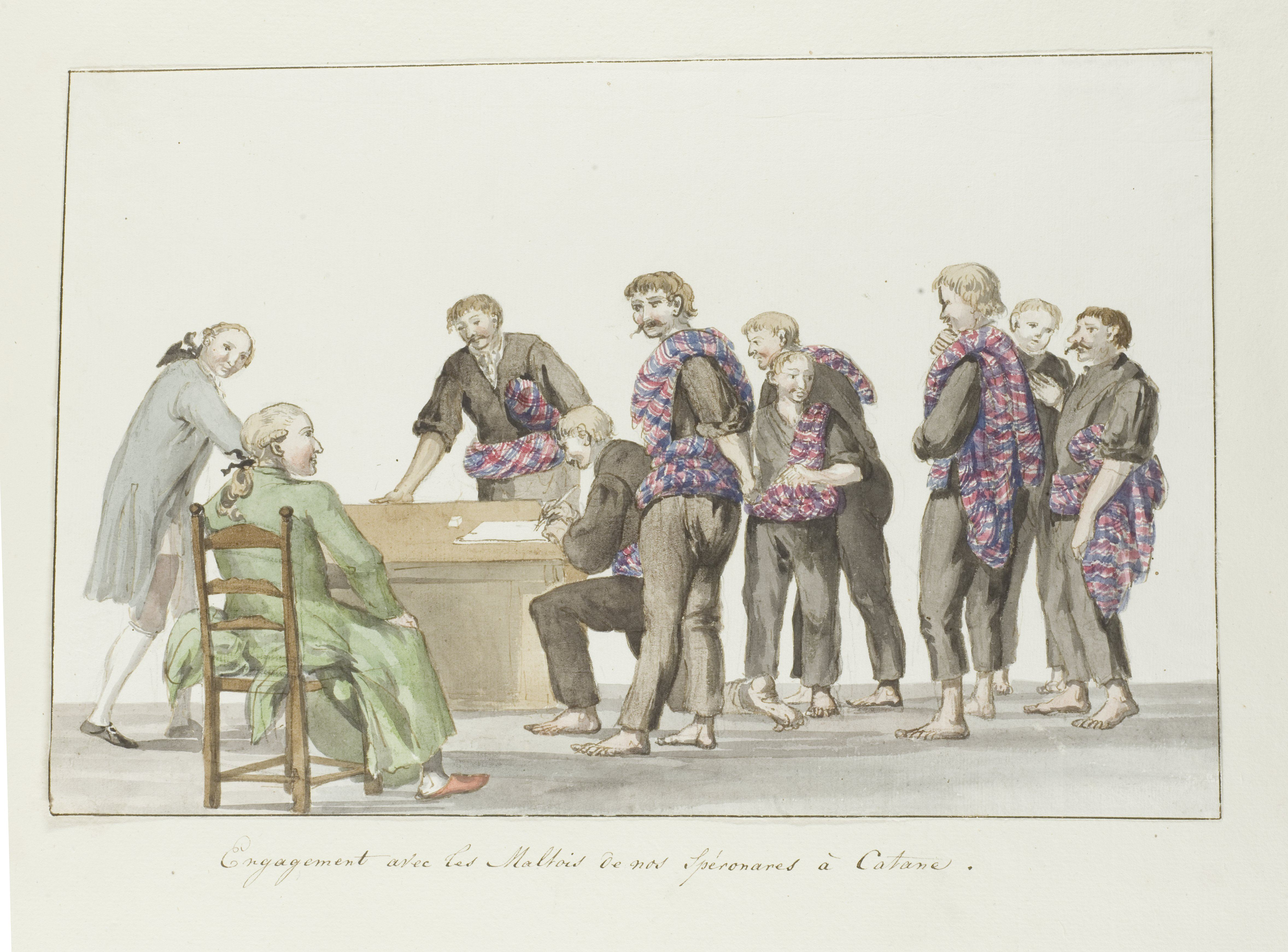 IdentificatieTitel(s): Kennismaking met matrozen van de Speronares schepen afkomstig uit Malta bij CataniëEngagement avec les Maltois de nos spéronares à Catane (titel op object)Voyage en Italie, en Sicile et à Malte - 1778 (serietitel)Objecttype: tekening aquarel Objectnummer: RP-T-00-493-66ACatalogusreferentie: Niemeijer&De Booy 223Opschriften / Merken: opschrift, verso, handgeschreven: ‘No 181 Engagement avec les Maltois de nos spéronares à Catane’Omschrijving: Tekening uit het album 'Voyage en Italie, en Sicile et à Malte', 1778.VervaardigingVervaardiger: tekenaar: Louis DucrosDatering: 1778Fysieke kenmerken: zwart krijt, aquarel, pen in bruinMateriaal: papier krijt waterverf Techniek: penseel / penAfmetingen: blad: h 239 mm × b 367 mmVerwerving en rechtenCredit line: Schenking van mevrouw Hansen-van den Brugghen, Den HaagVerwerving: schenking 1948Copyright: Publiek domein